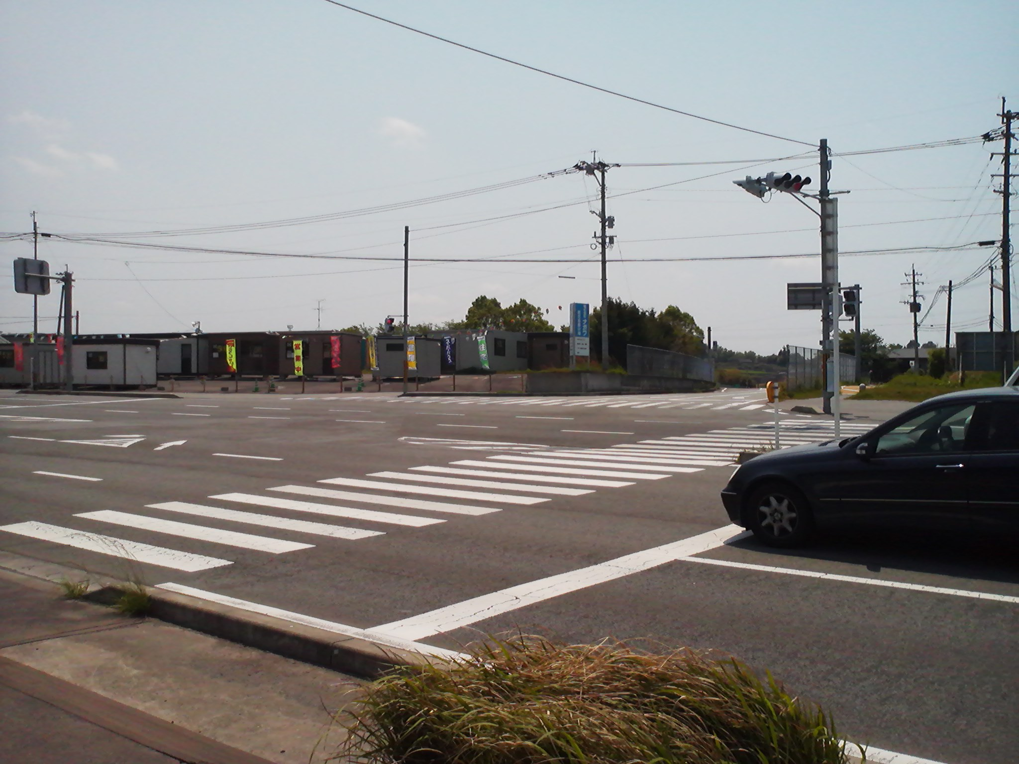 南九州西回り自動車道松元インターチェンジの入口付近撮影